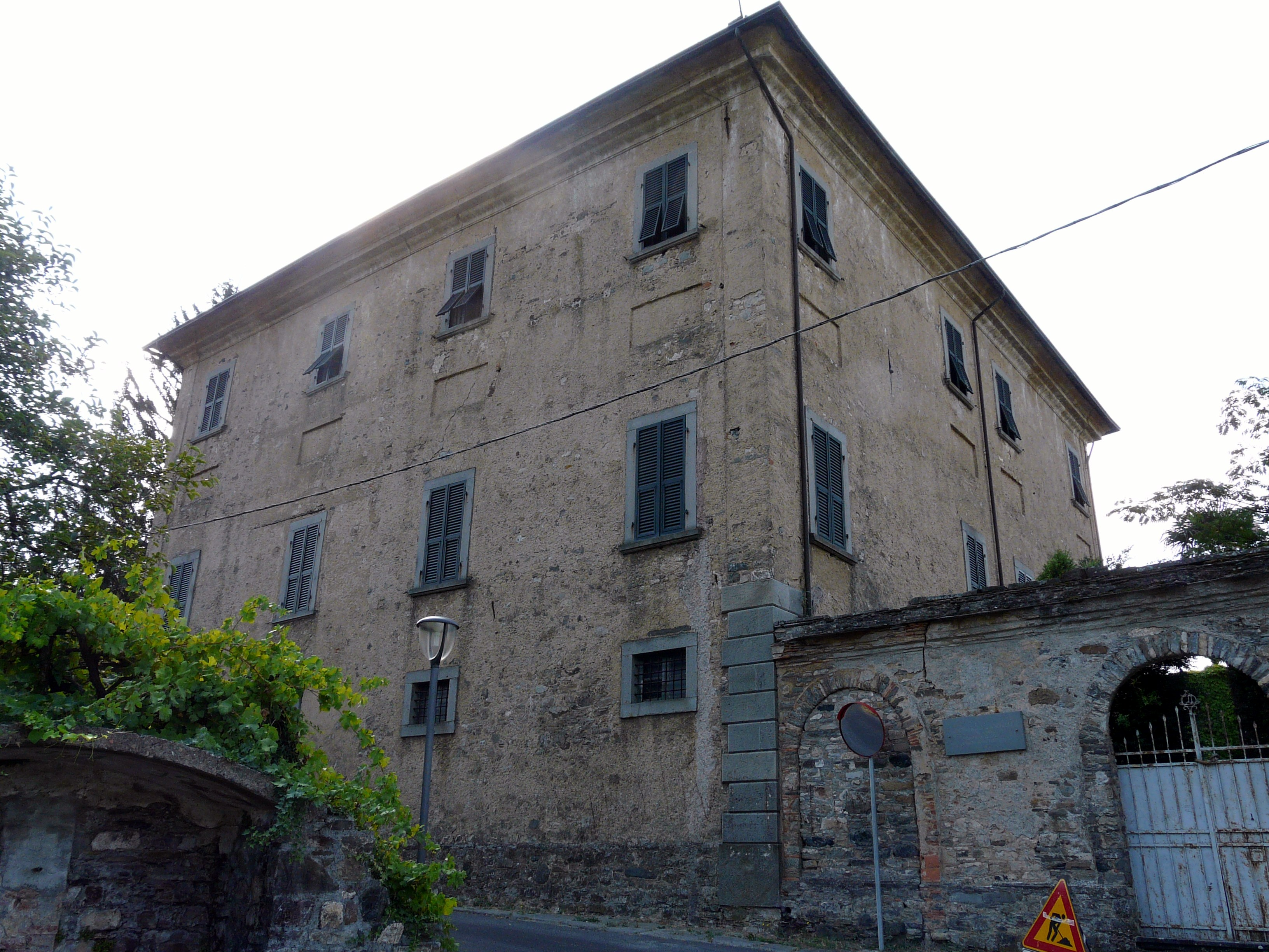 Villa Zucchini Zanelli, Veppo, Rocchetta di Vara, Liguria, Italia